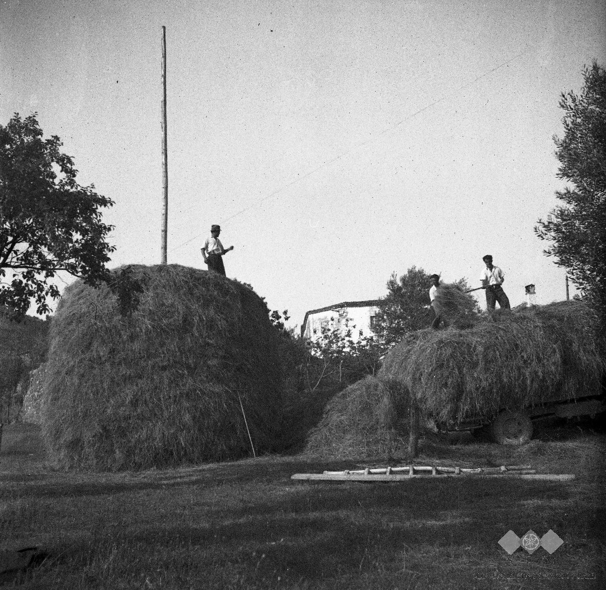 Kopo delajo (seno so pripeljali iz Kopra). Kopa je zadružna, Babiči pri Marezigah.